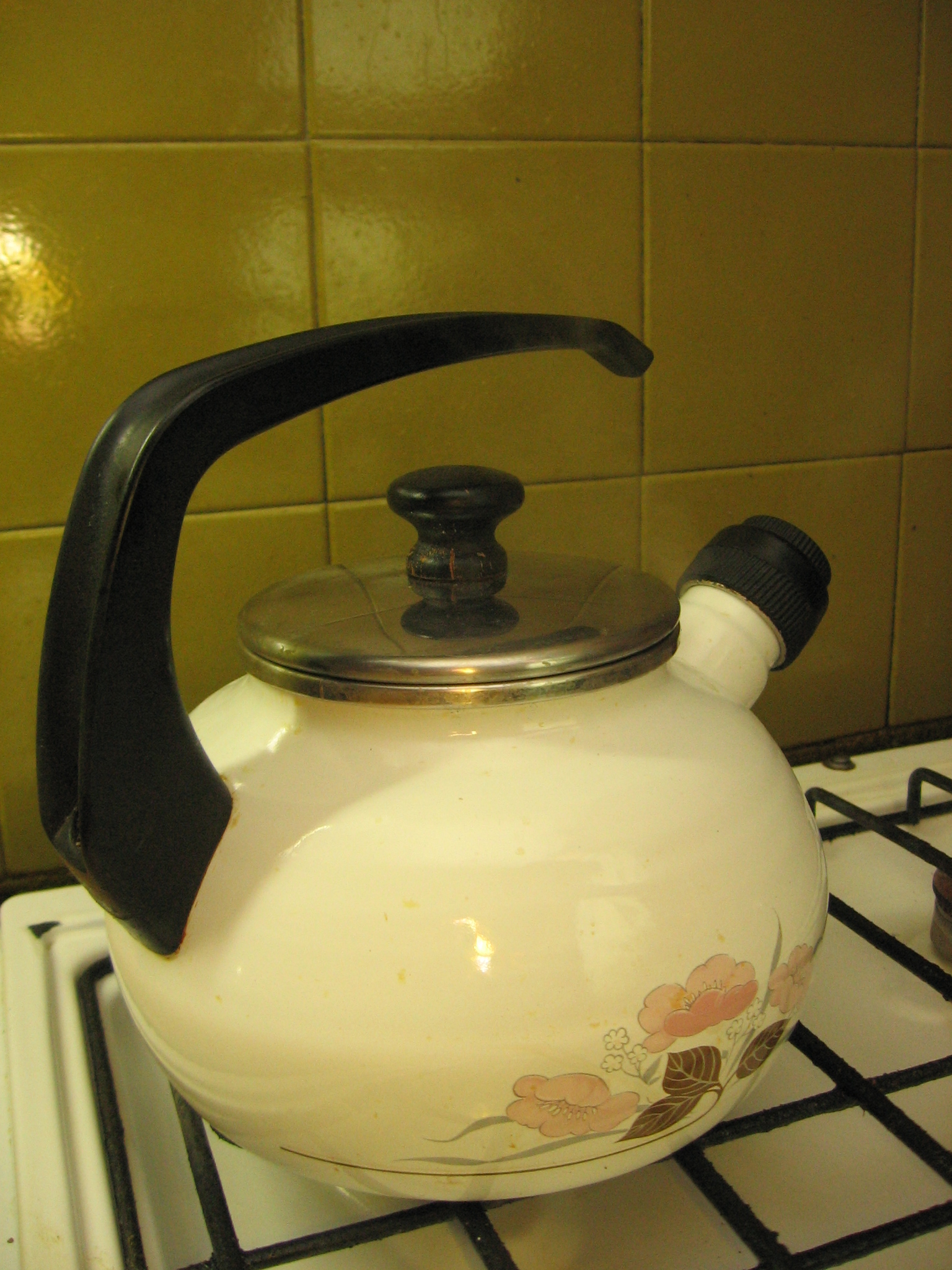 czajnik z gwizdkiem na kuchni gazowej